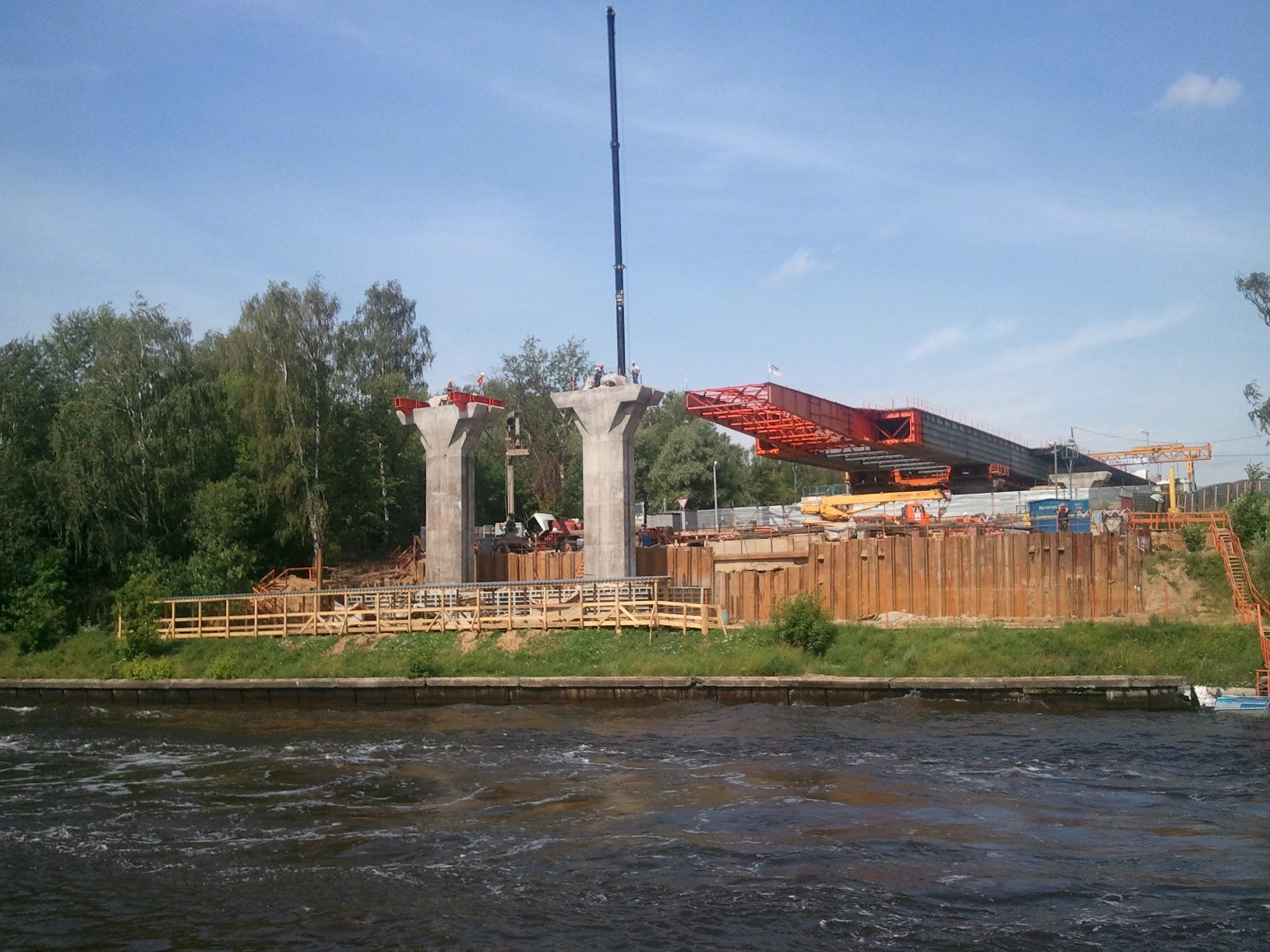 Строительство эстакады скоростной автомагистрали Москва — Санкт-Петербург над каналом имени Москвы